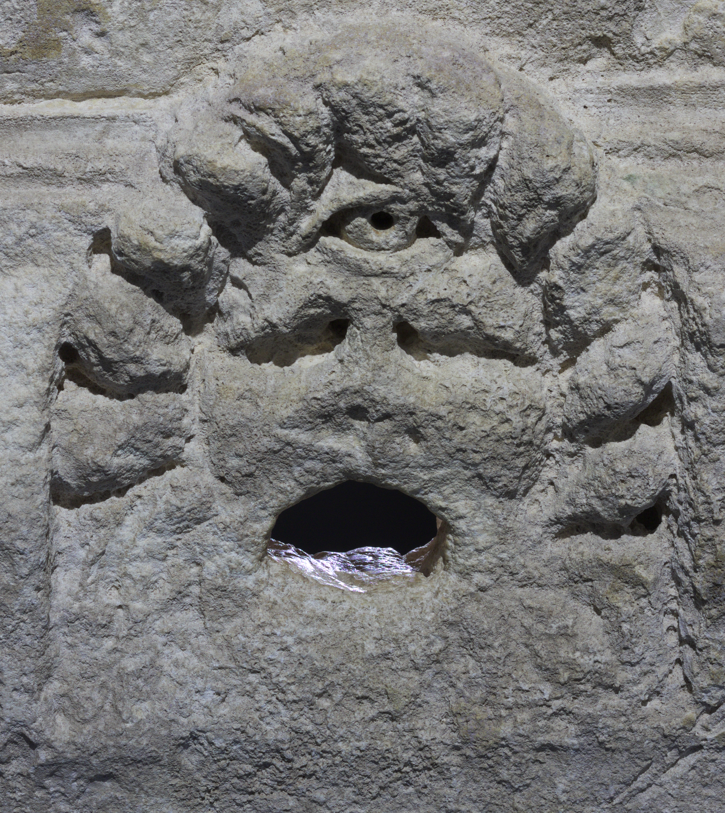 Découverte à Lyon en 1967, calcaire.